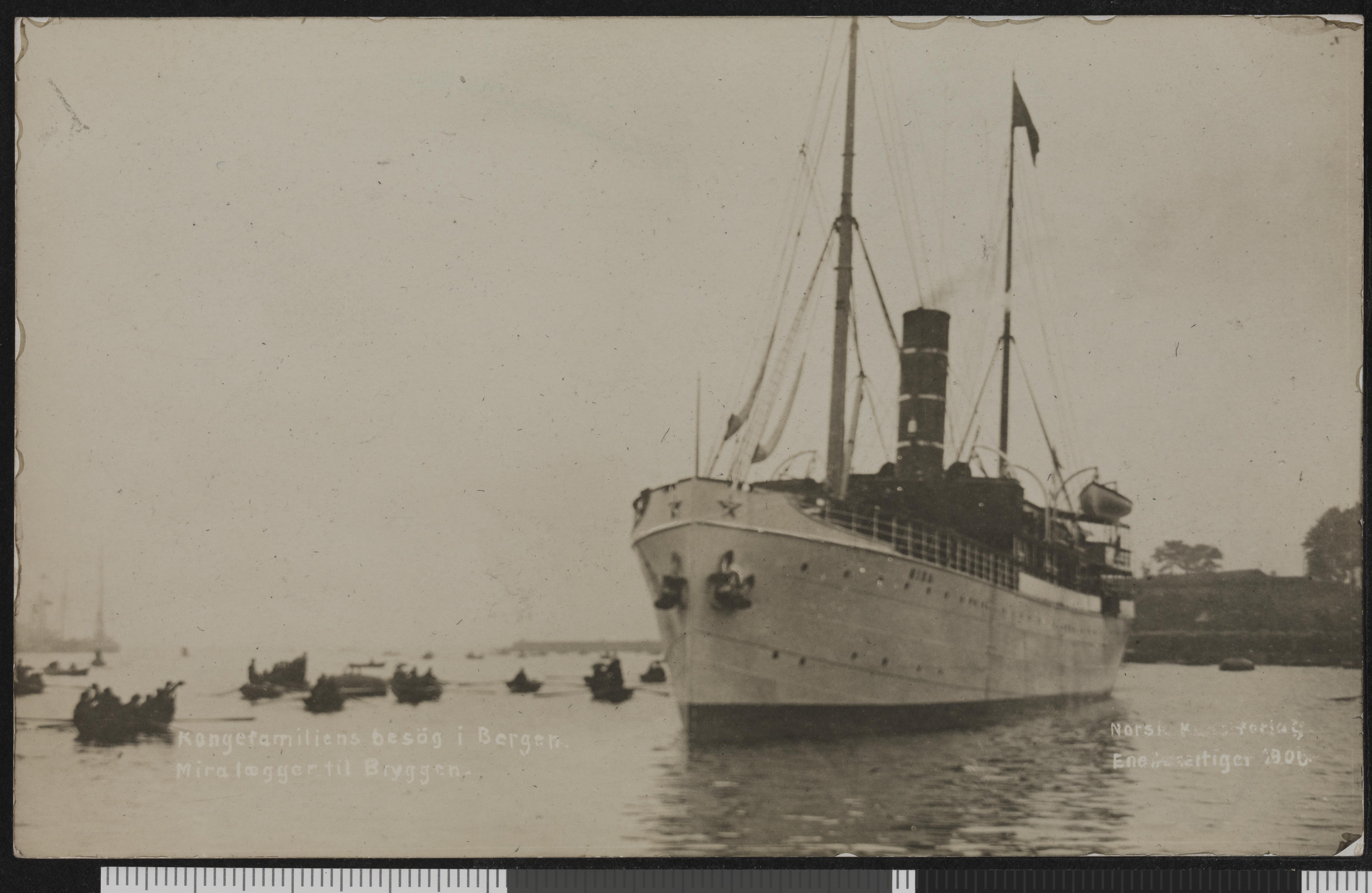 Bildet er hentet fra Nasjonalbibliotekets bildesamling Bergen, Hordaland